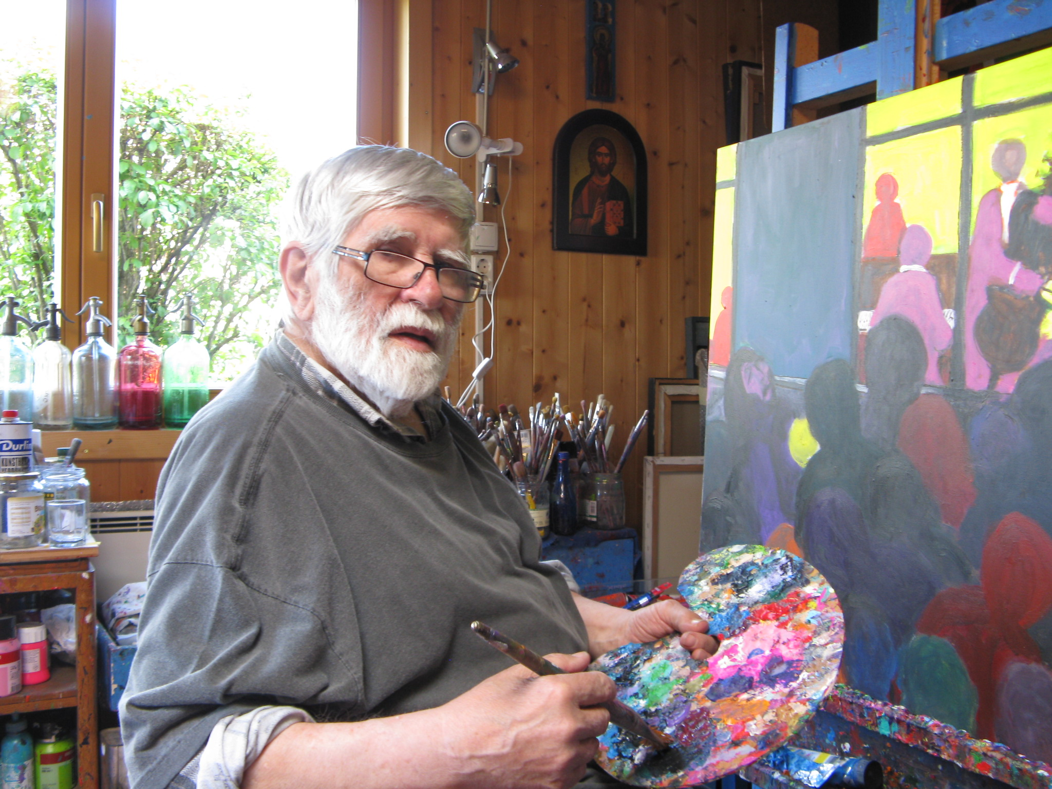 Prof. Robert Hammerstiel, österreichischer Maler, in seinem Atelier in Potschach (Ternitz)